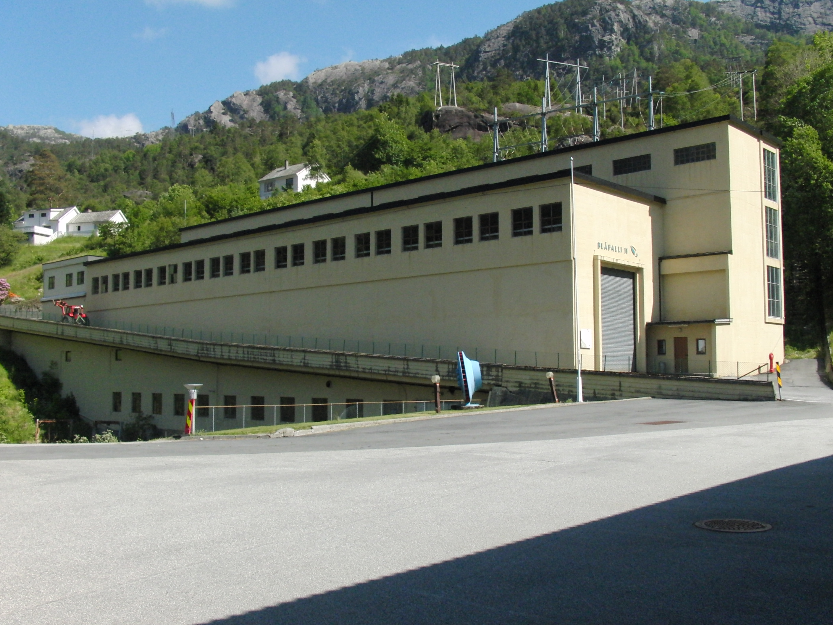 Blåfalli II kraftverk